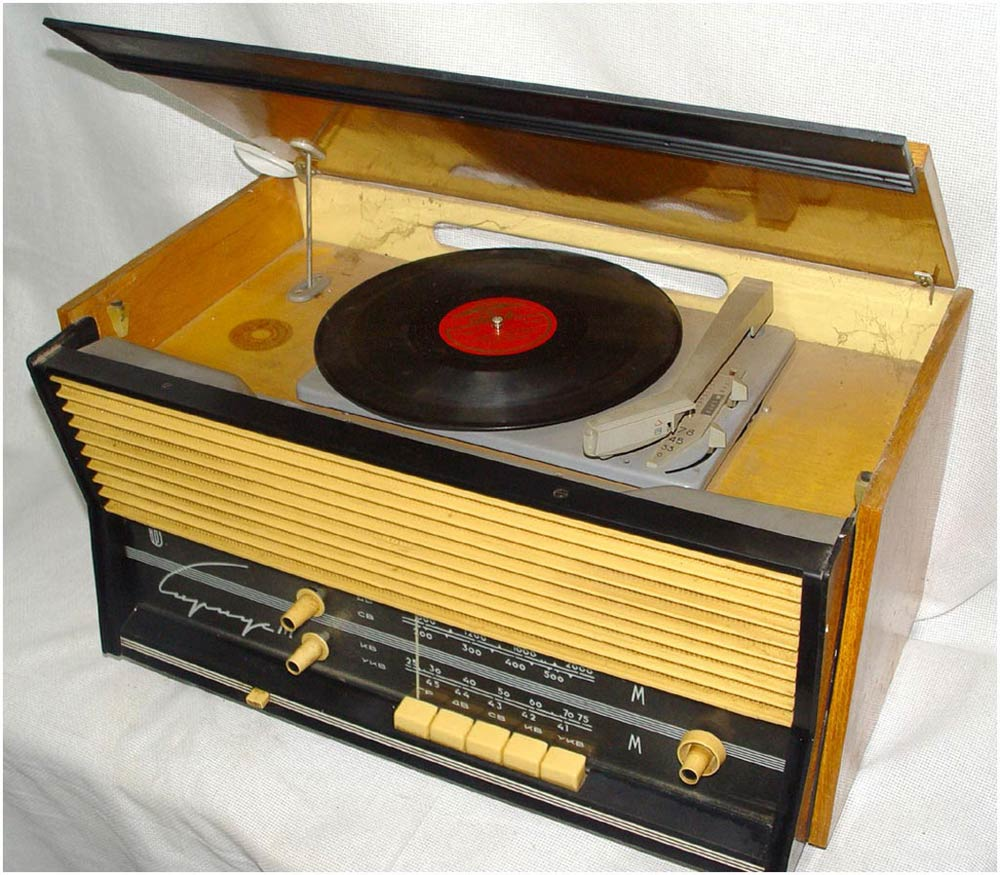 Сетевая настольная ламповая радиола 3 класса Сириус-М